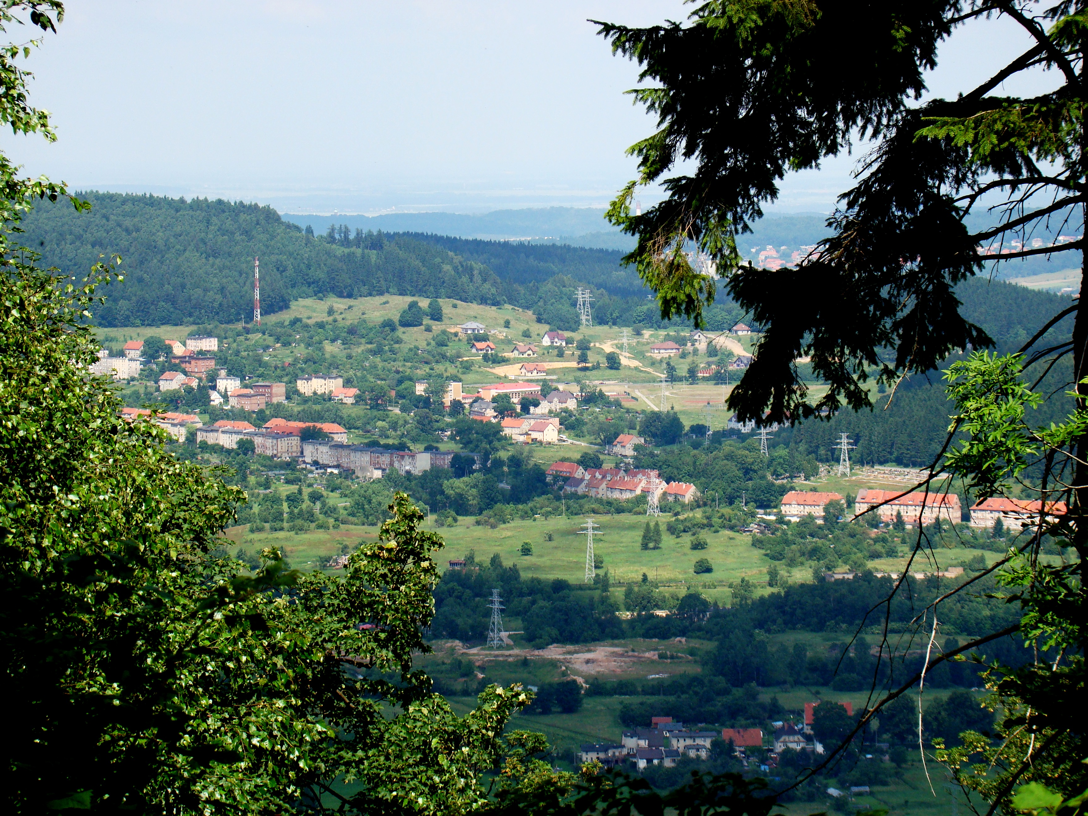 Boguszów-Gorce, miasto